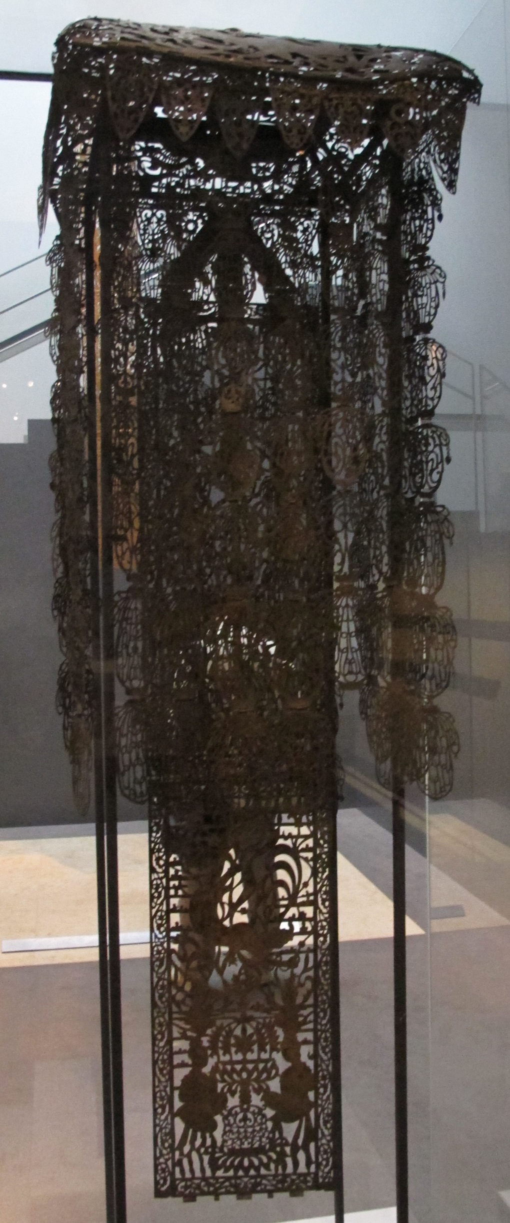 Periodo asuka, kanjo-ban, VII sec